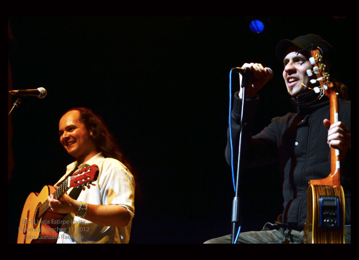 De derecha a izquierda Tabaré Cardozo y Fabián Pintos, en espectáculo de De La Vieja Estirpe. Foto by Gonzalo Pacheco.